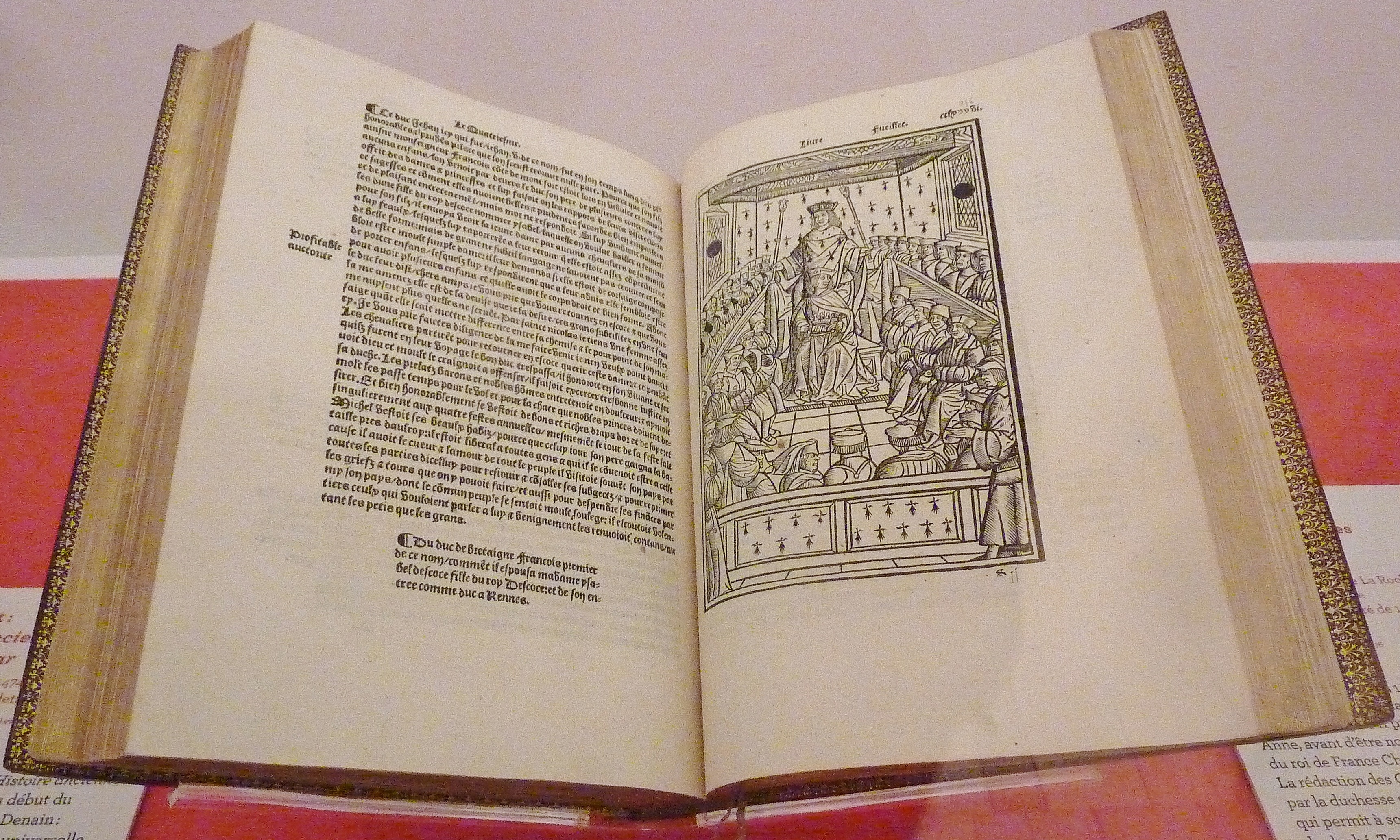 Alain Bouchart : Les grandes chroniques de Bretaigne (livre imprimé en 1514 par Jean de La Roche)